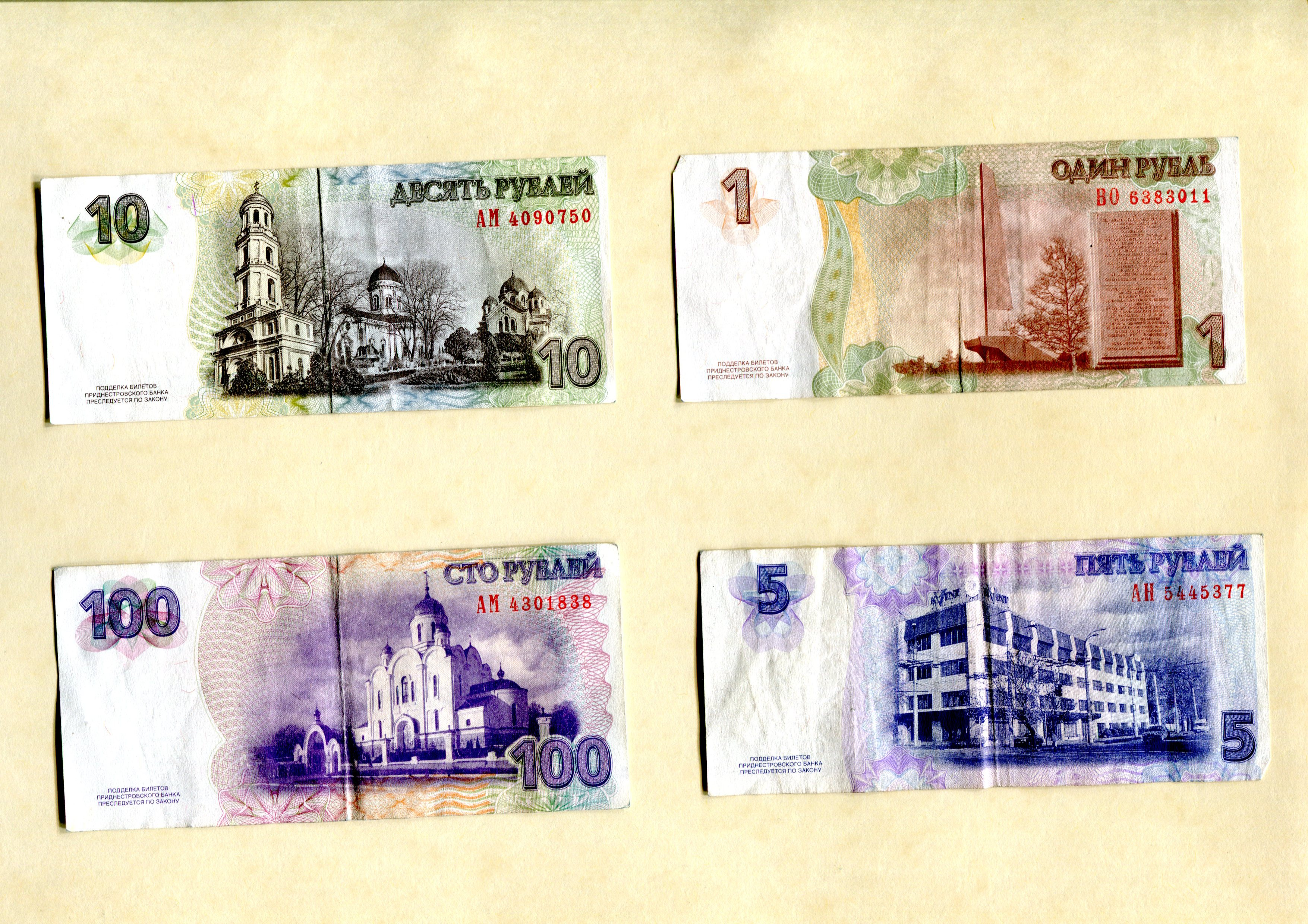 Different billet existant et cours en RMP (République Moldave du Dniestr)